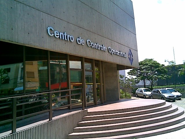 Imagem da entrada do Centro de Controle Operacional do Metrô de São